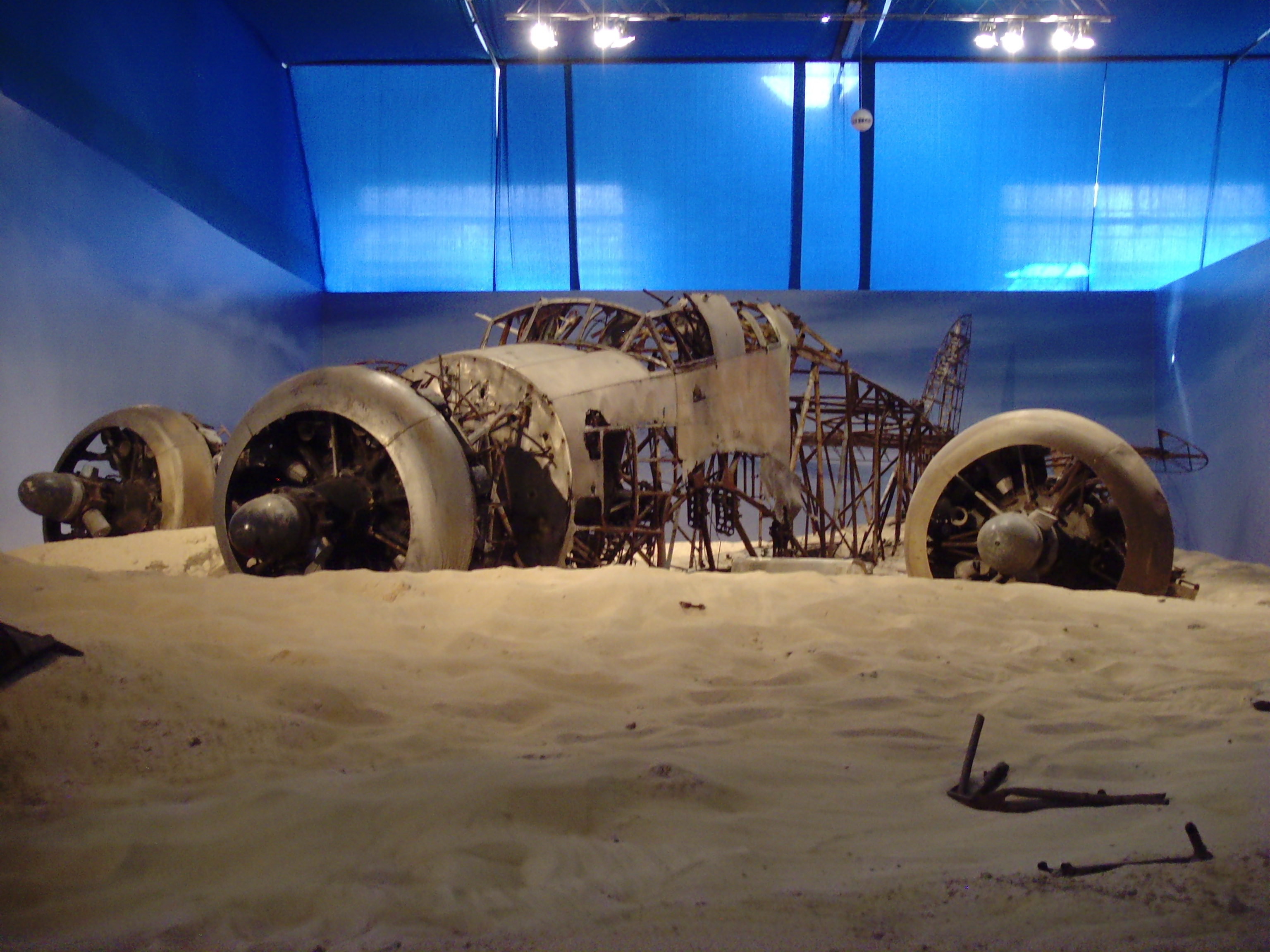 32 Volandia